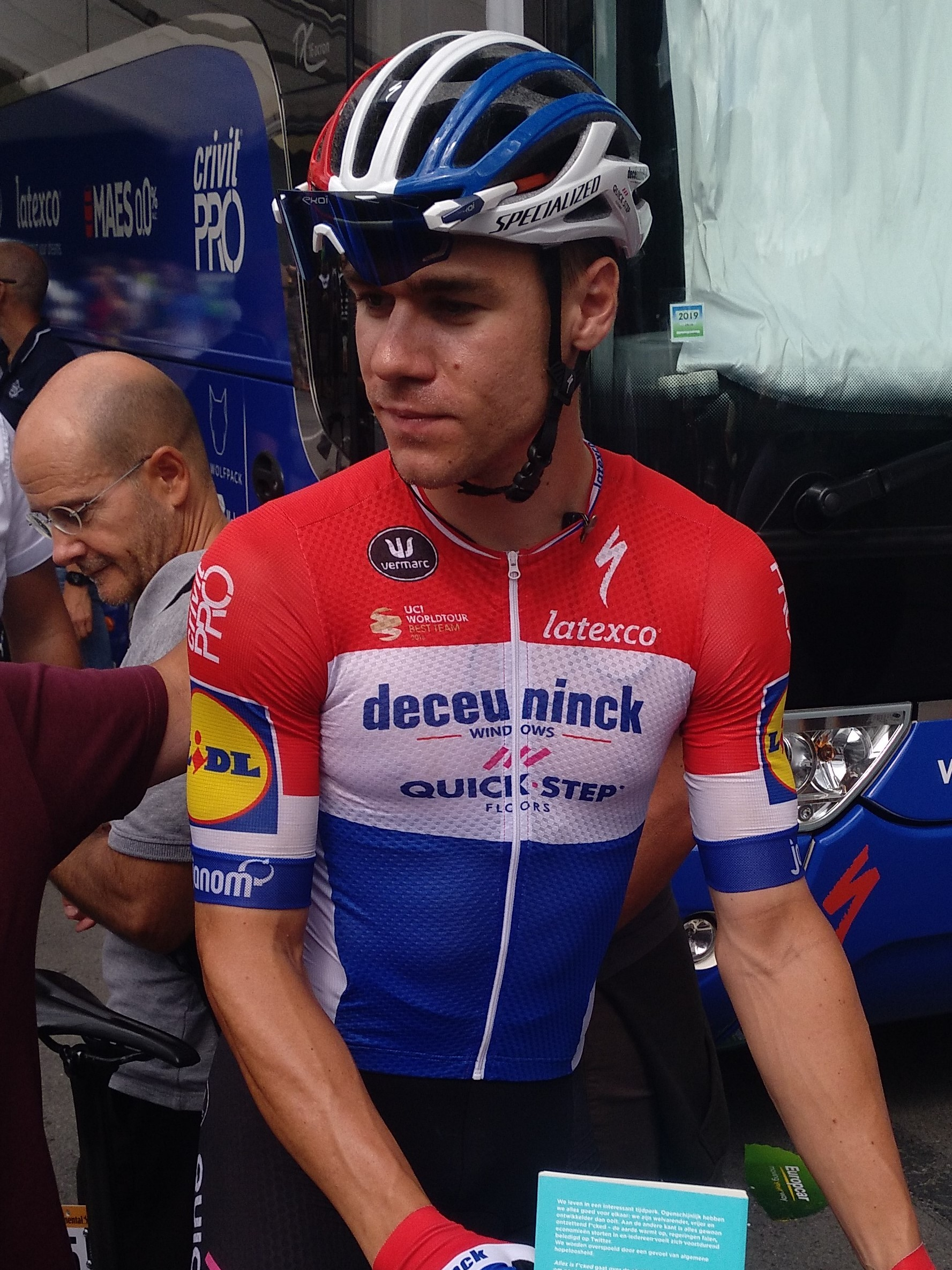 Fabio Jakobsen, del equipo Deceuninck-Quick Step, en la salida en Bilbao en la 13ª etapa de la Vuelta a España 2019